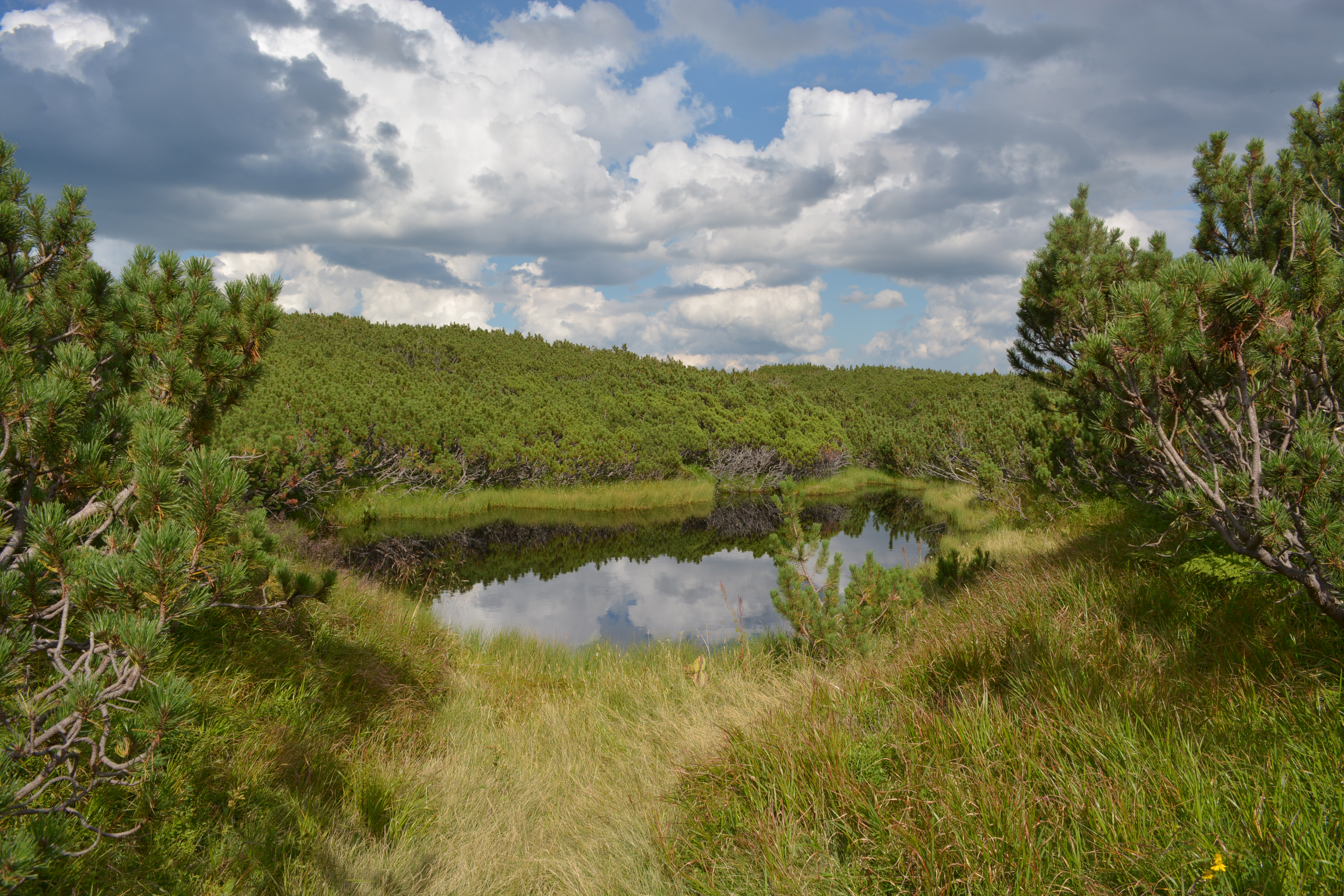 Озерце Гаджинка, загальний вид з півдня, де на березі є невелика галявинка. Так само як і заховане знаходиться в суцільних заростях чагарнику.